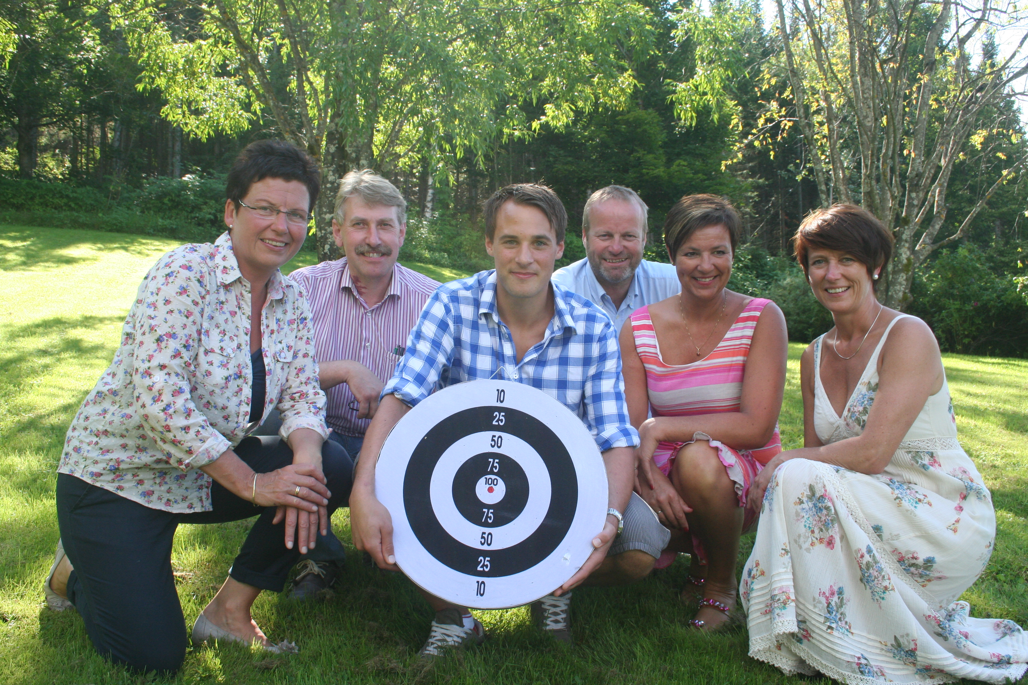 Eli Blakstad, Kåre Helland, Gunnar Kaus, Ivar Odnes, Anne Tingelstad Wøien og Aud Hove